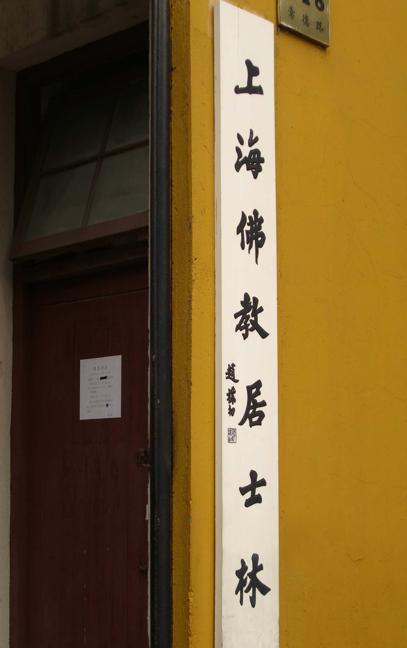 上海佛教居士林正门